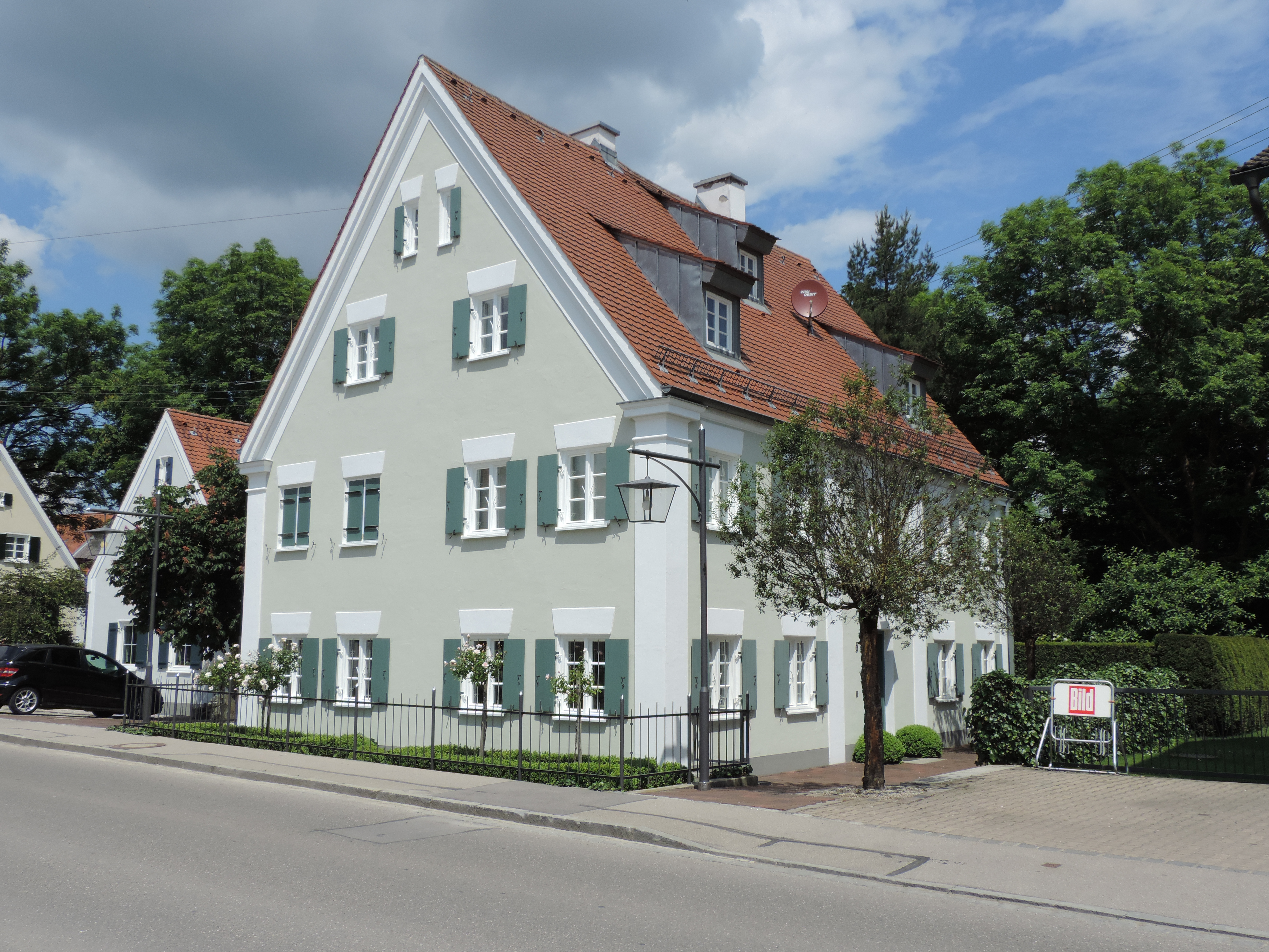 ehemaliges Pfarrhaus Oberottmarshausen